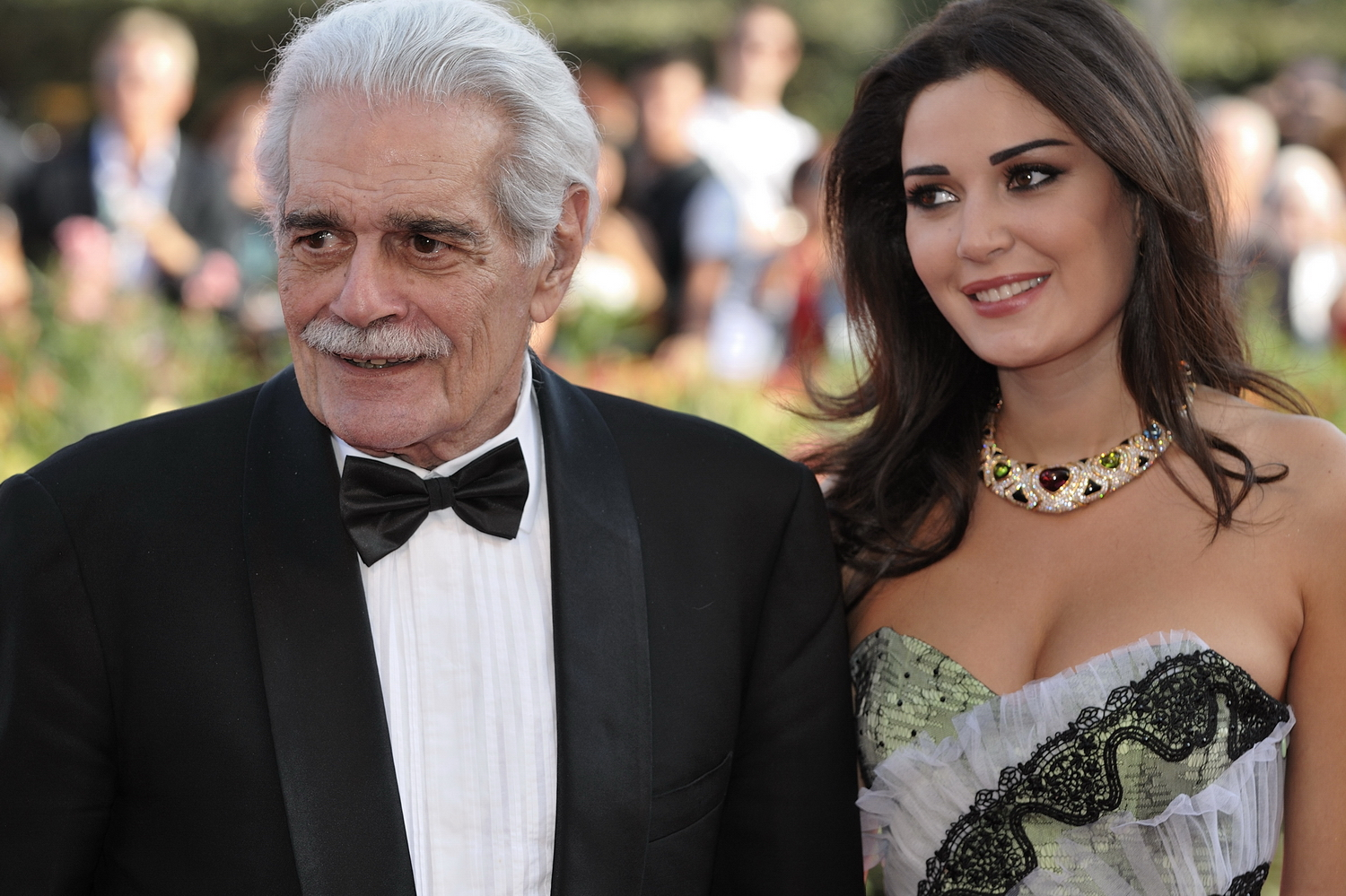 66ème Festival du Cinéma de Venise (Mostra), 9ème jour (10/09/2009) Tapis rouge avec Omar Sharif et Cyrine AbdelNour pour le film The Traveller de Ahmed Maher